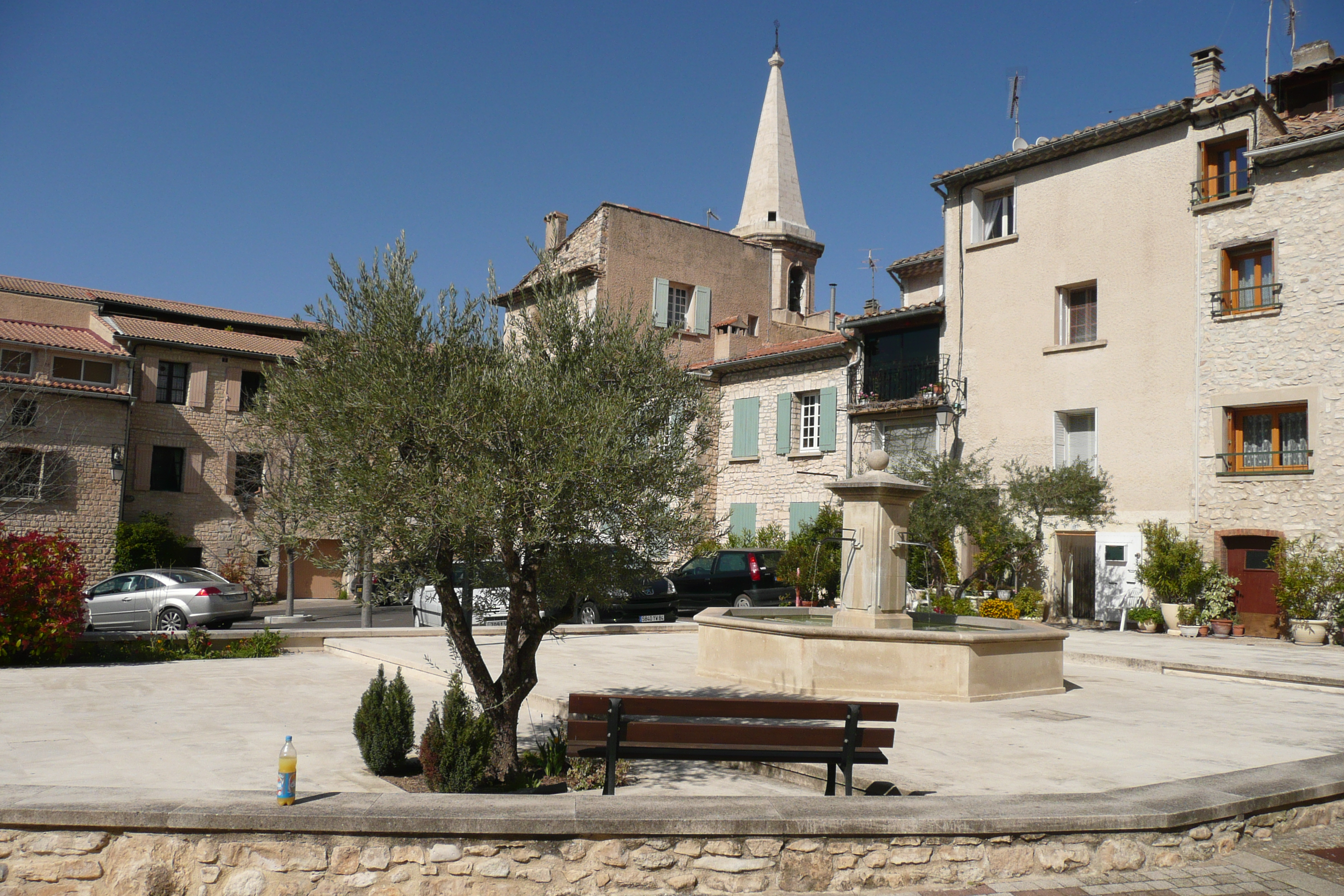 Place avec fontaine à Saint-Didier (Vaucluse)